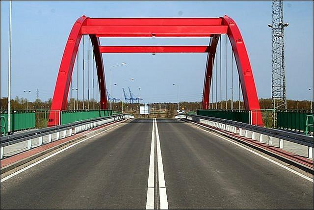 Gdańsk Wyspa Portowa - wiadukt w ciągu ulicy Ku Ujściu.